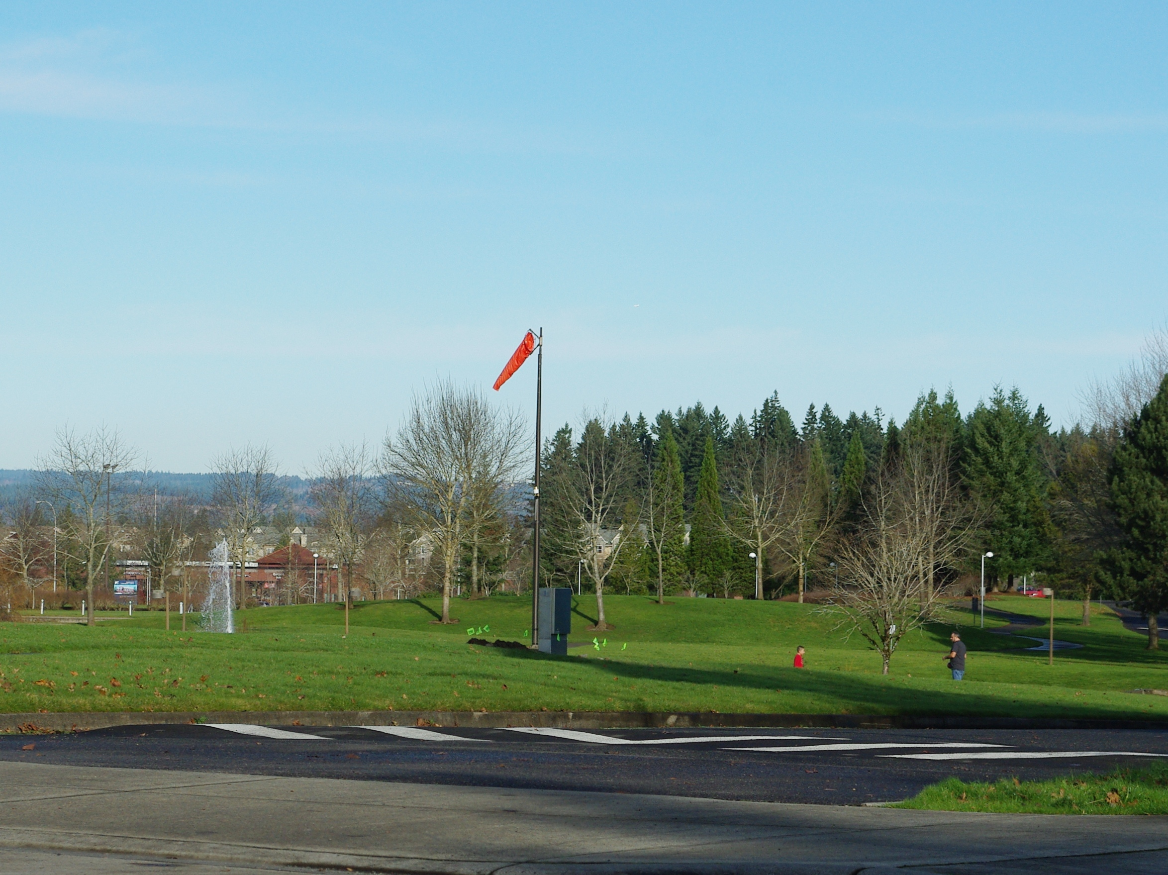 Amber Glen Business Center Heliport in Hillsboro, Oregon.